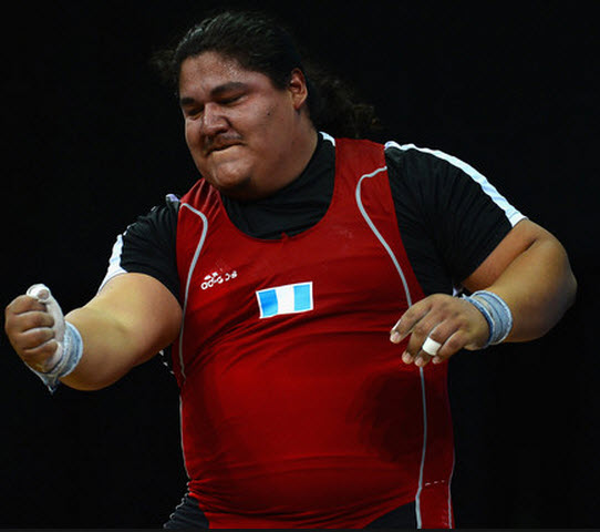 Atleta de alto nivel Guatemala